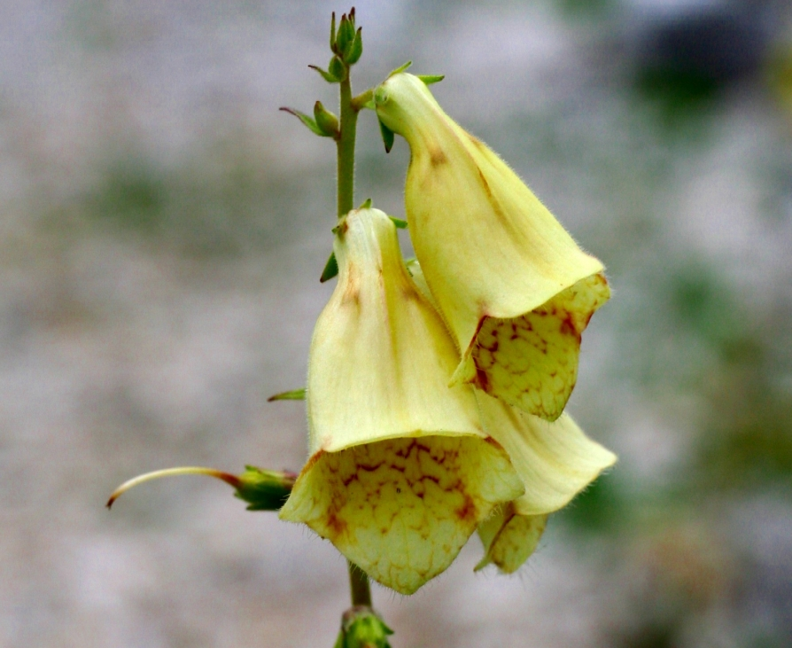 Digitalis_grandiflora (Digitale gialla grande) Località:"Giardino Botanico delle Alpi Orientali", Monte Faverghera (BL), 1500 m s.l.m.